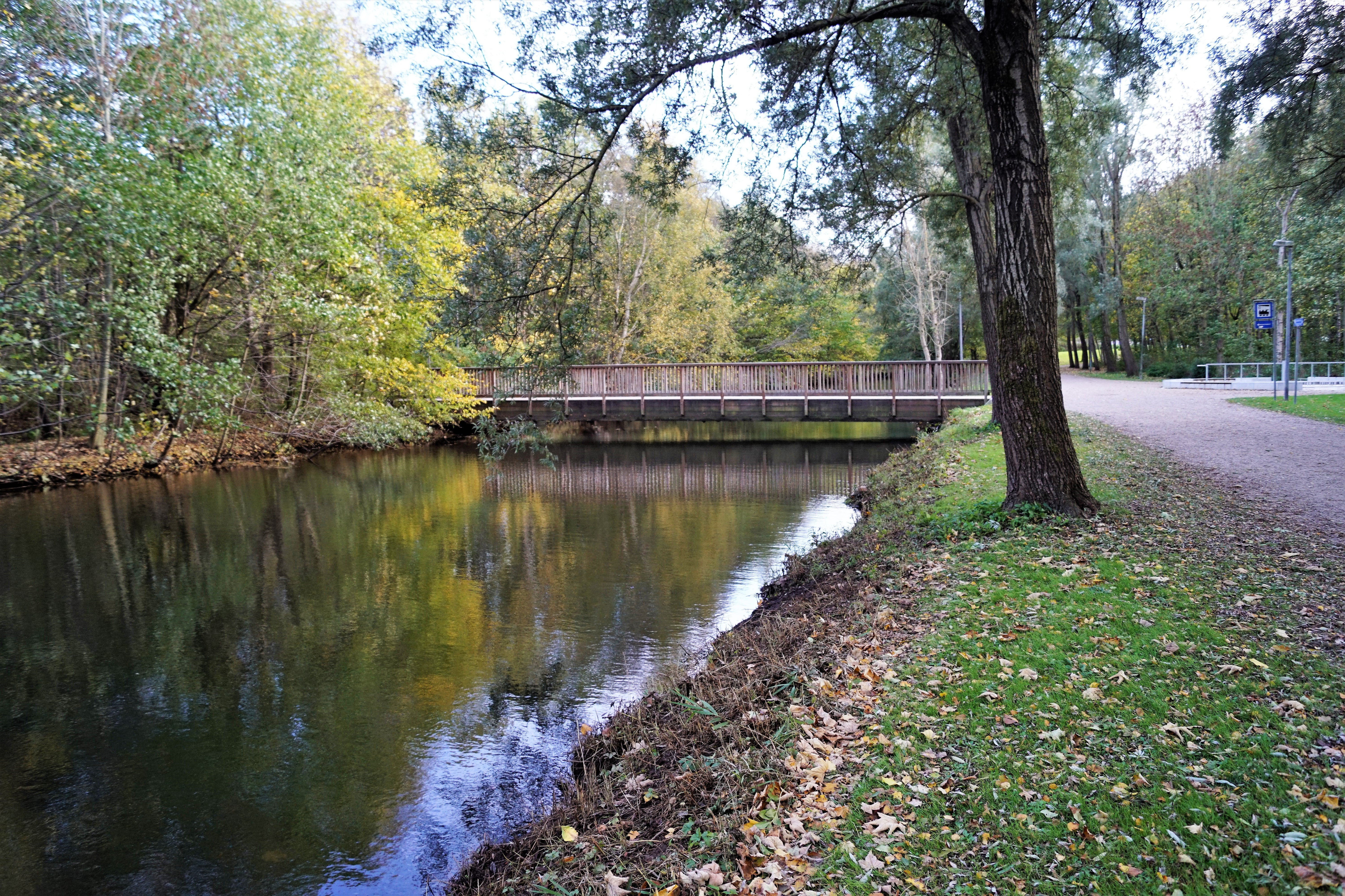 Bygholm Å i parken ved Bygholm